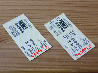 仙台市営地下鉄 バス乗継乗車券 左：自動改札機投入前 右：自動改札機投入後